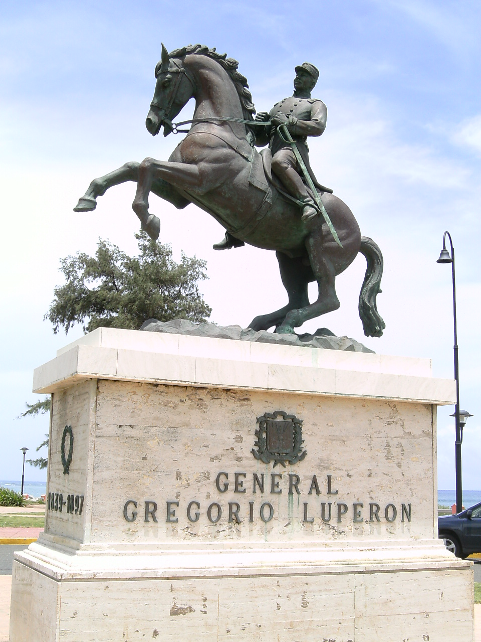 Estatua Ecuestre del General Luperon en la ´´Puntilla del Malecon´´ cerca de la fortaleza San Felipe